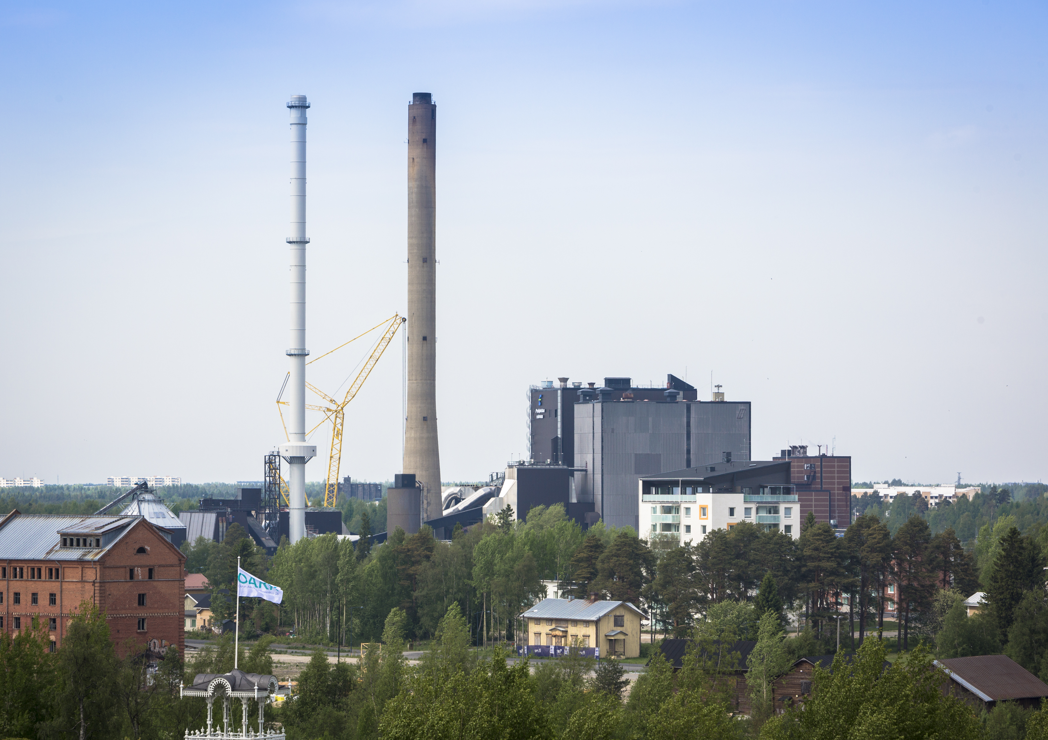 Toppila 1 ja 2.